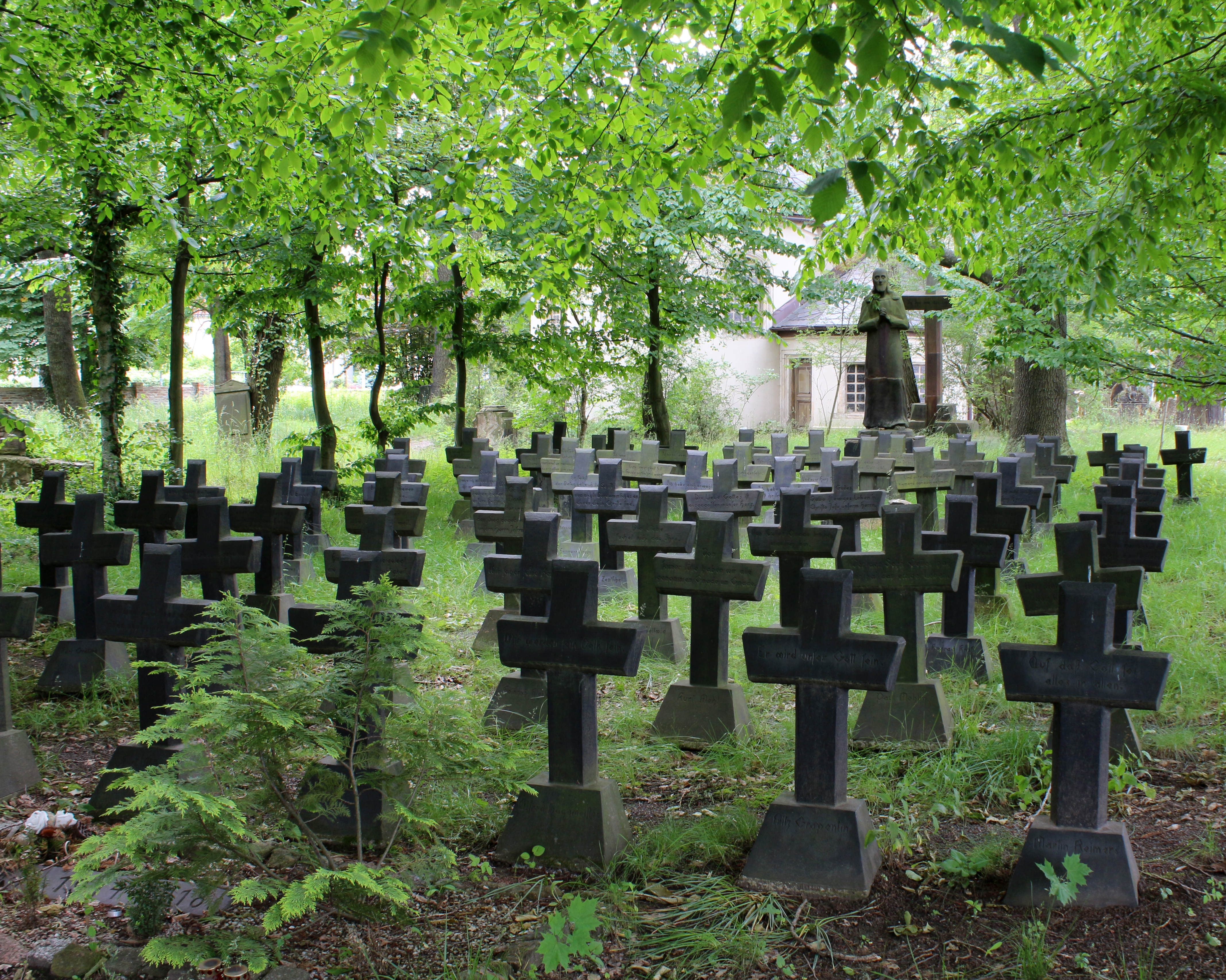 Kirche Johannes der Täufer in Diemitz, Halle (Saale), 1931 errichtete Gedenkstätte für die im Ersten Weltkrieg gefallenen Bewohner von Diemitz